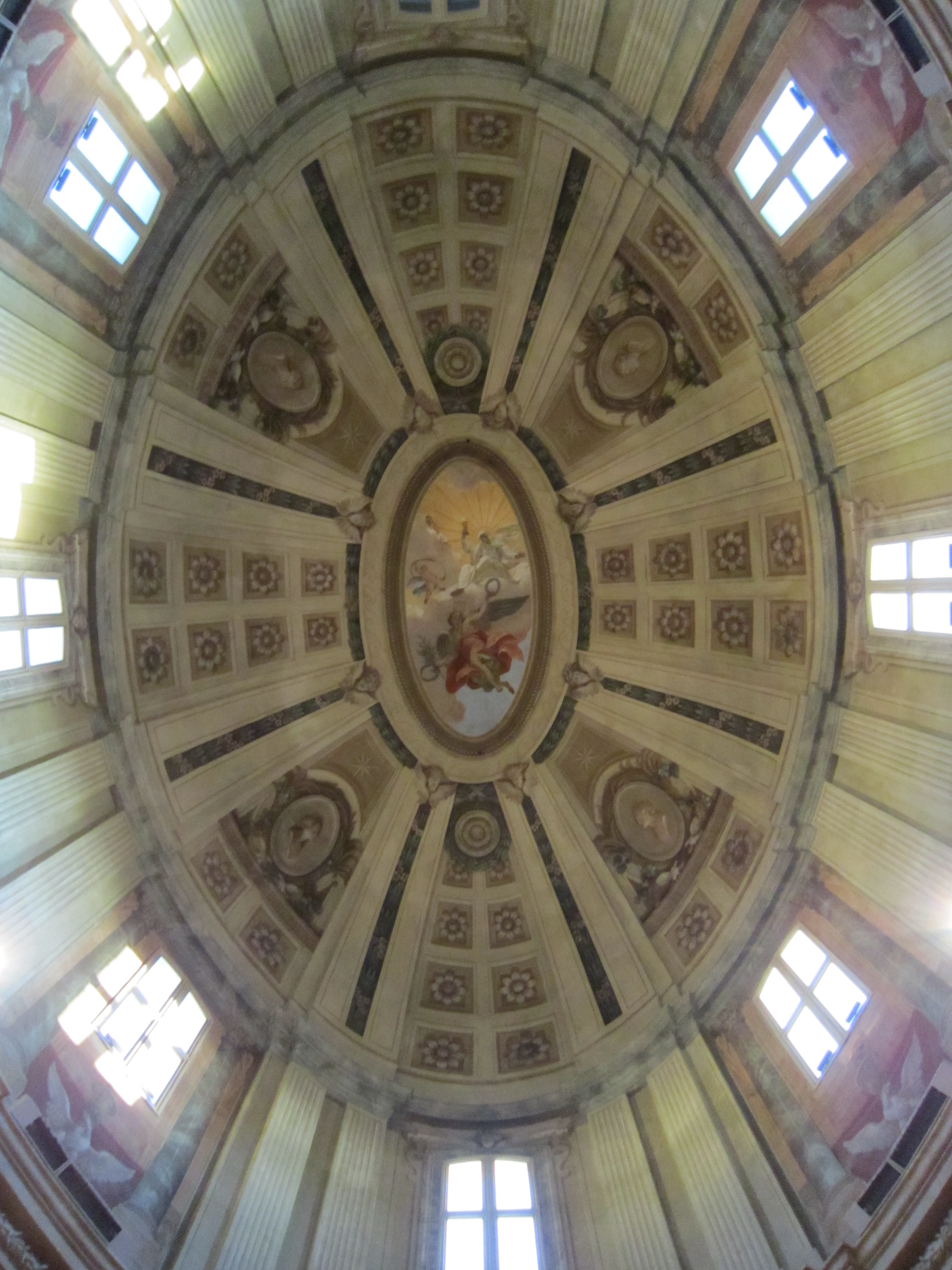 Chiesa di Santa Maria della Visitazione (Forlì), volta, foto propria